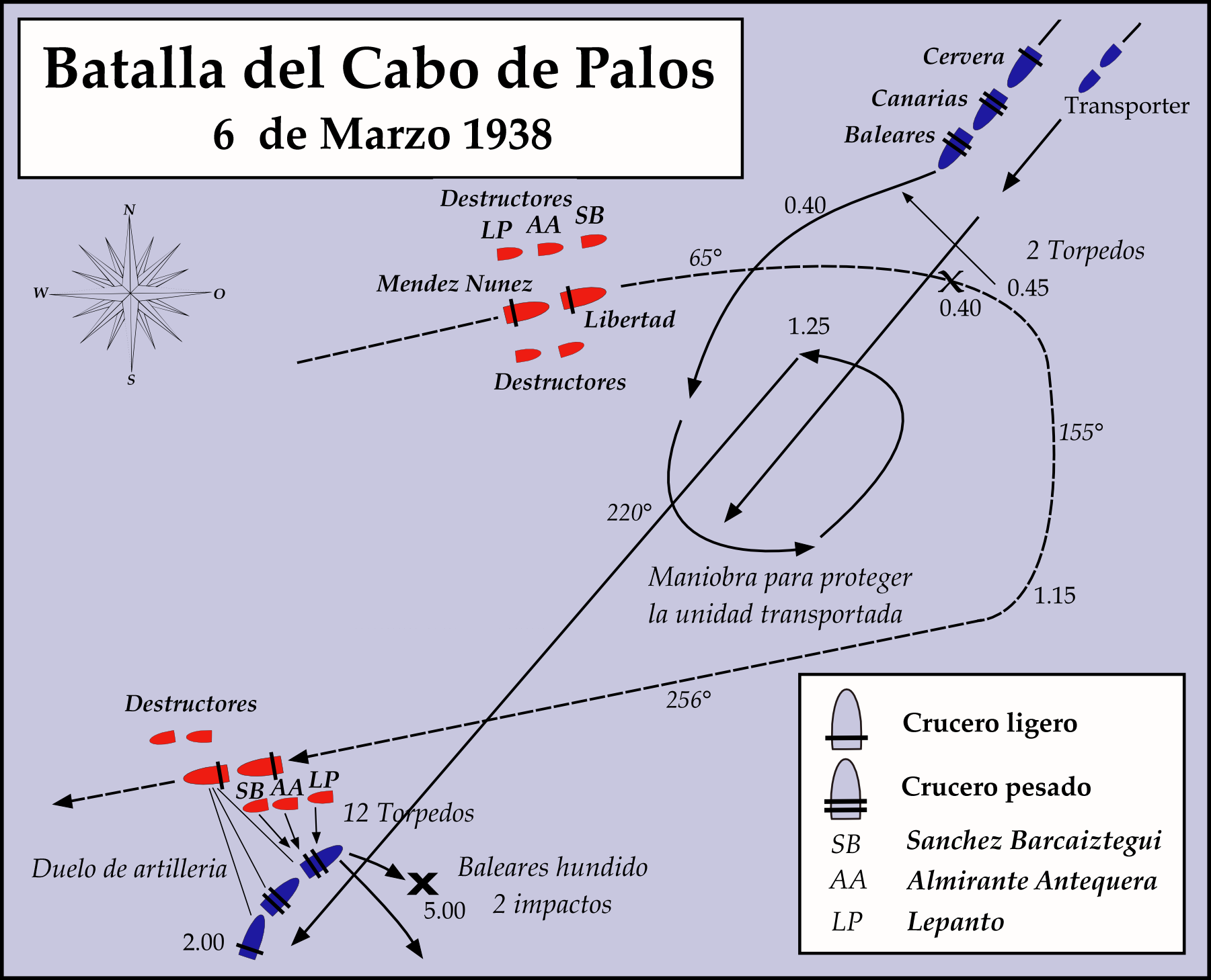 Mapa de la batalla naval del Cabo de Palos el 6 de marzo de 1938